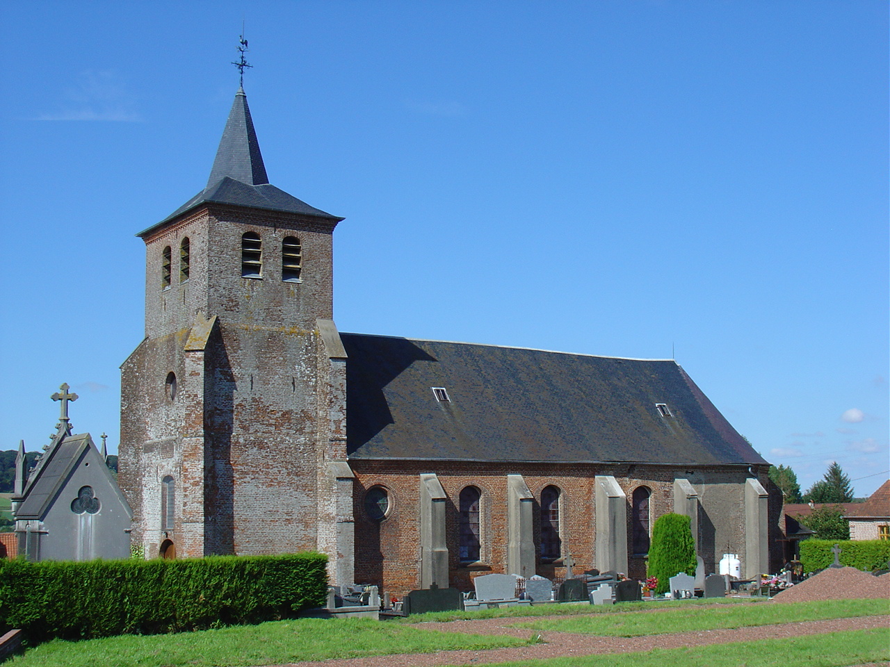 Église de Marconnelle